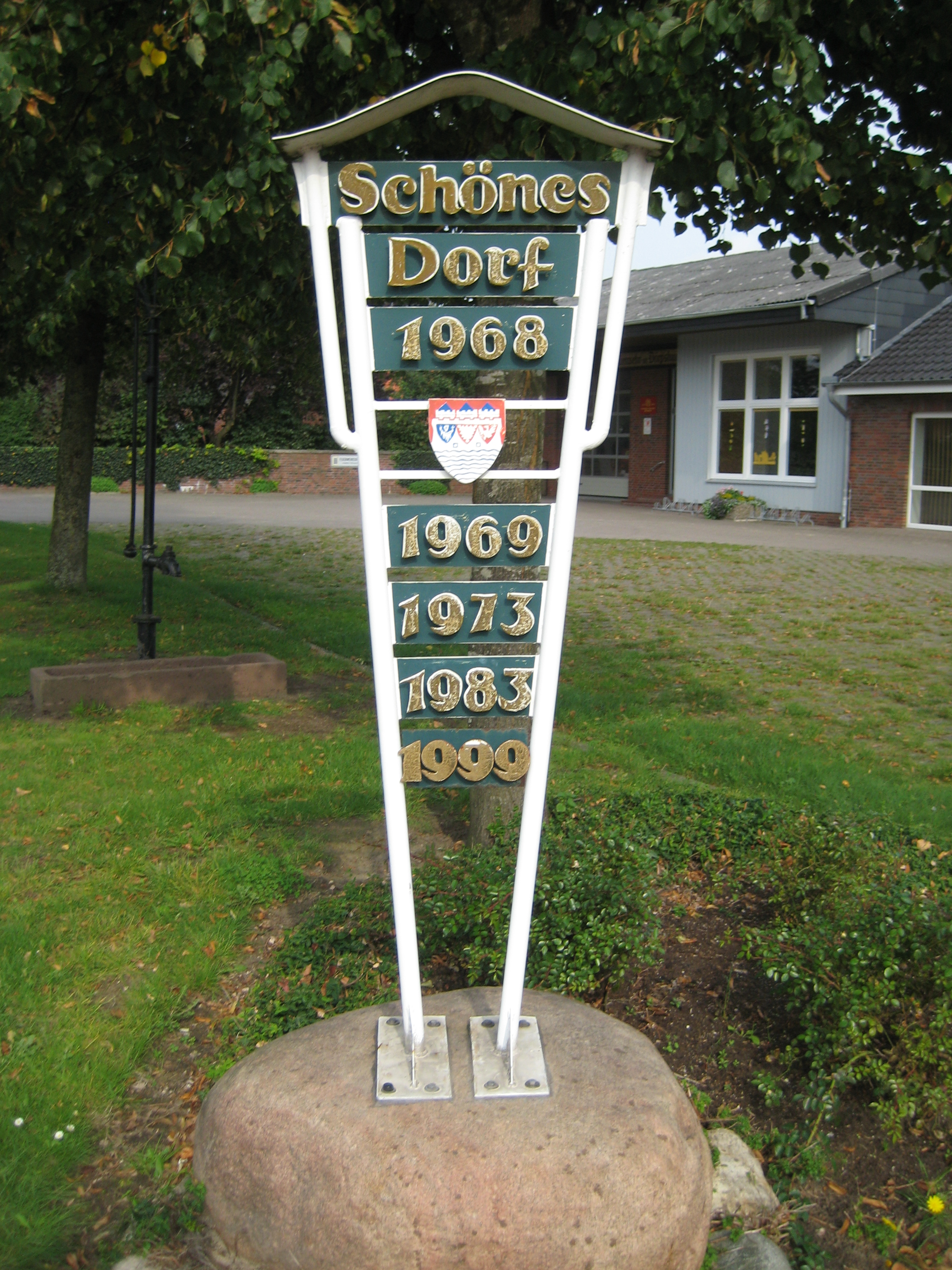 Zum Gedenken an die verschiedenen Wettbewerbe Unser Dorf soll schöner werden